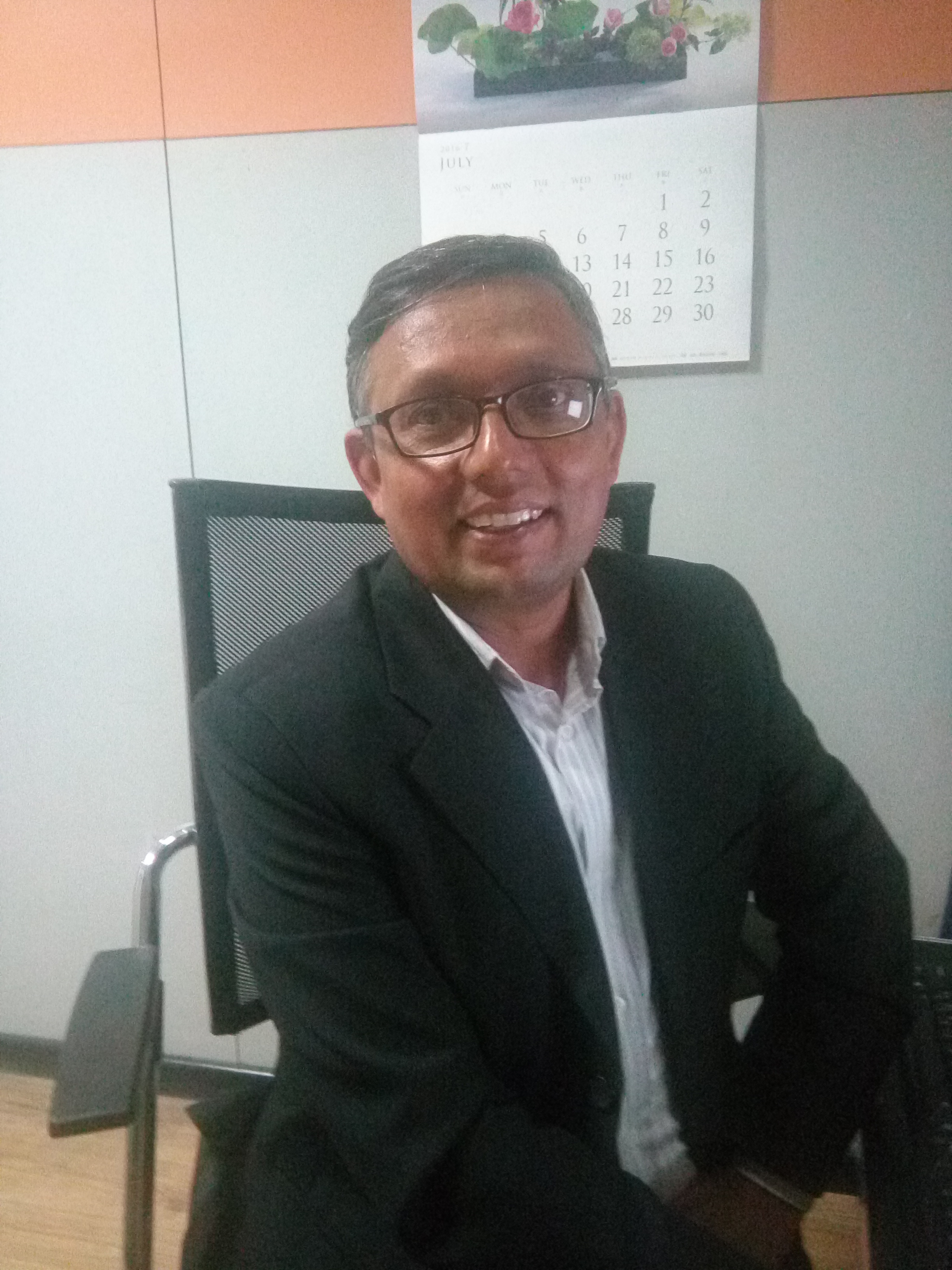 Gunaraj Luitel at his desk in Nagarik Daily, August 2016